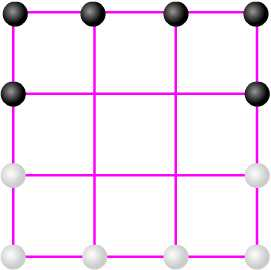 六子棋棋盘 创作者：user:zhuwq 创作时间:2005年3月24日晚